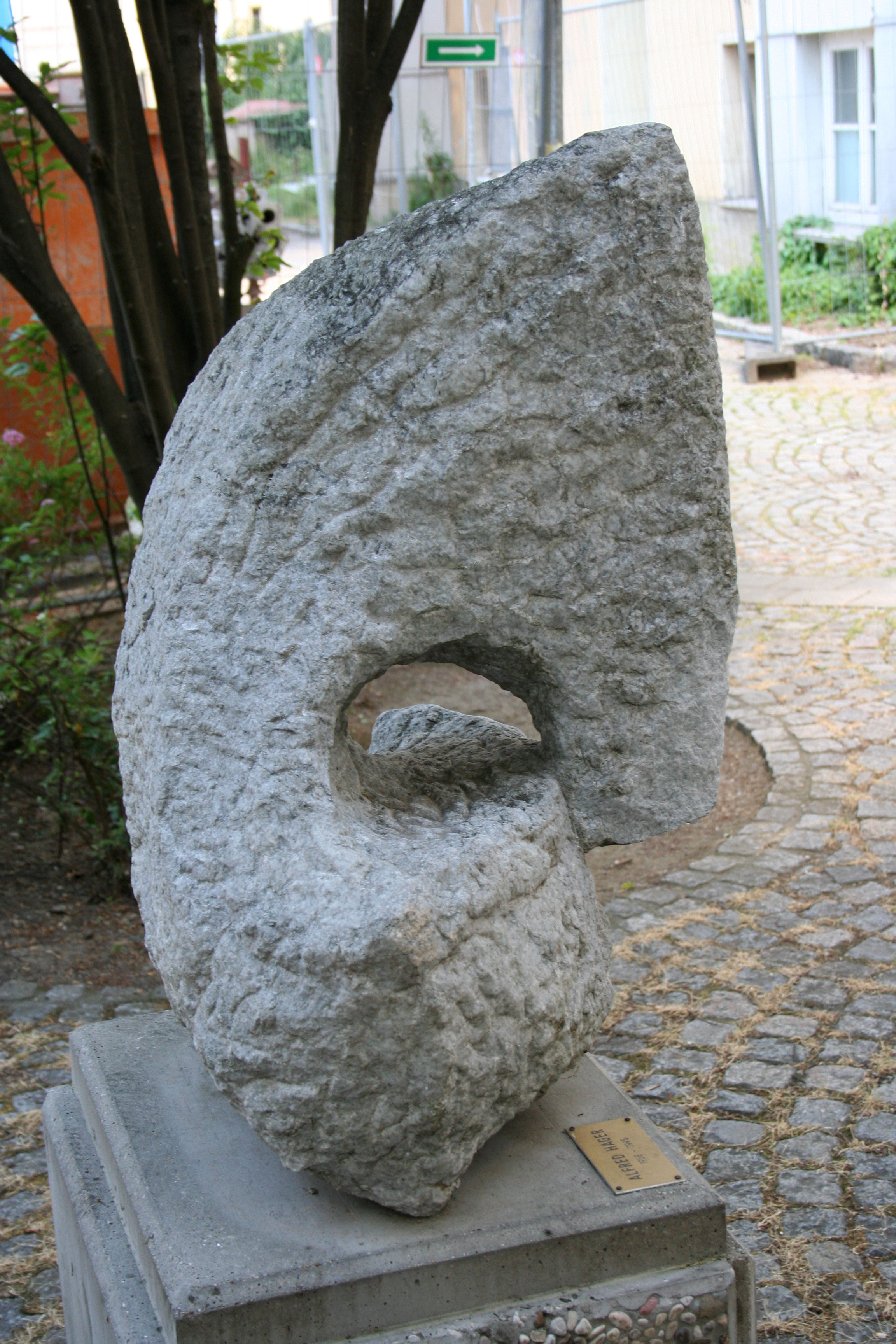 Skulptur von Alfred Hager im Innenhof der Goetheschule in der Linzer Innenstadt